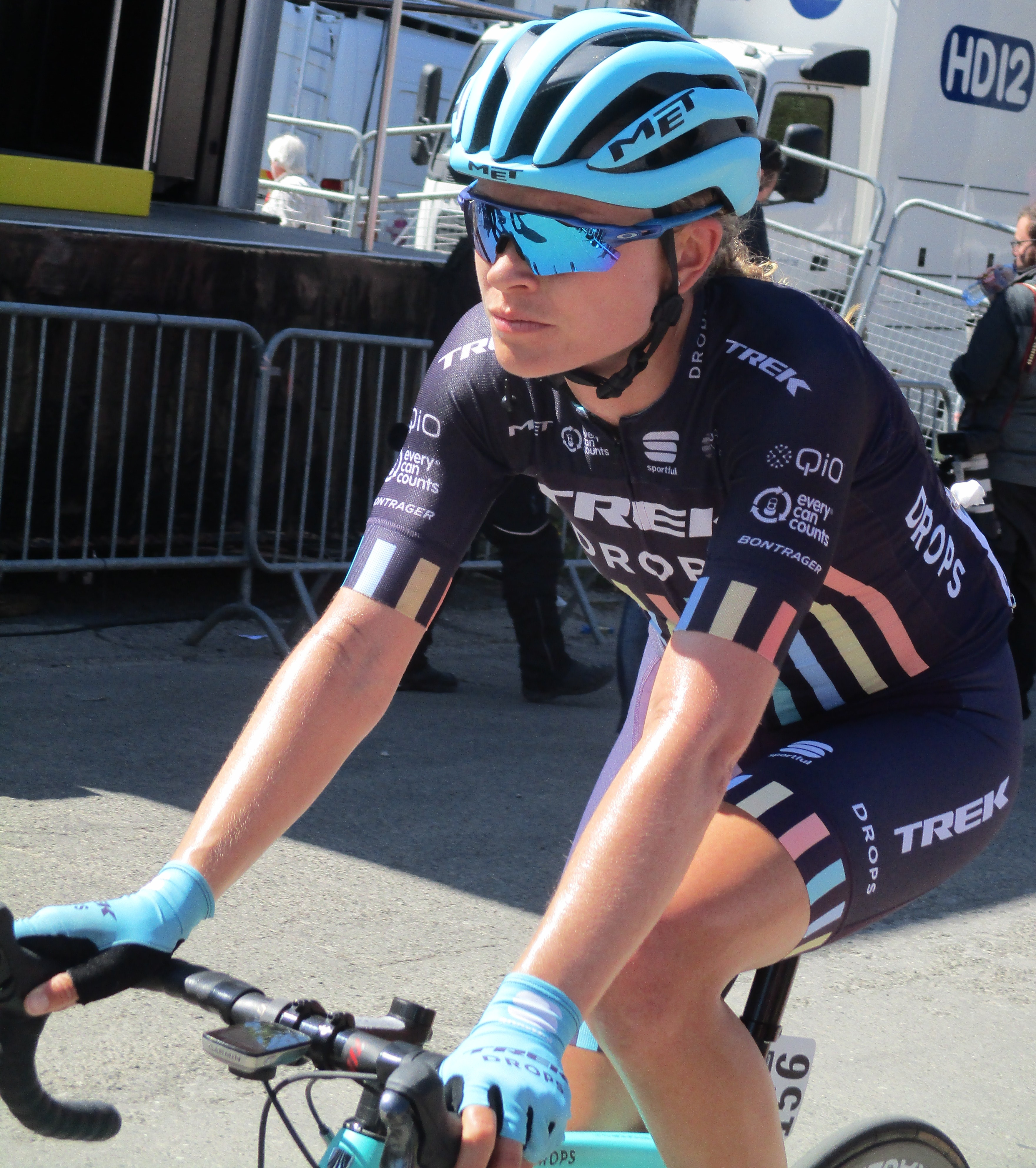 Finish van de Waalse Pijl 2018 op de Mur van Huy.